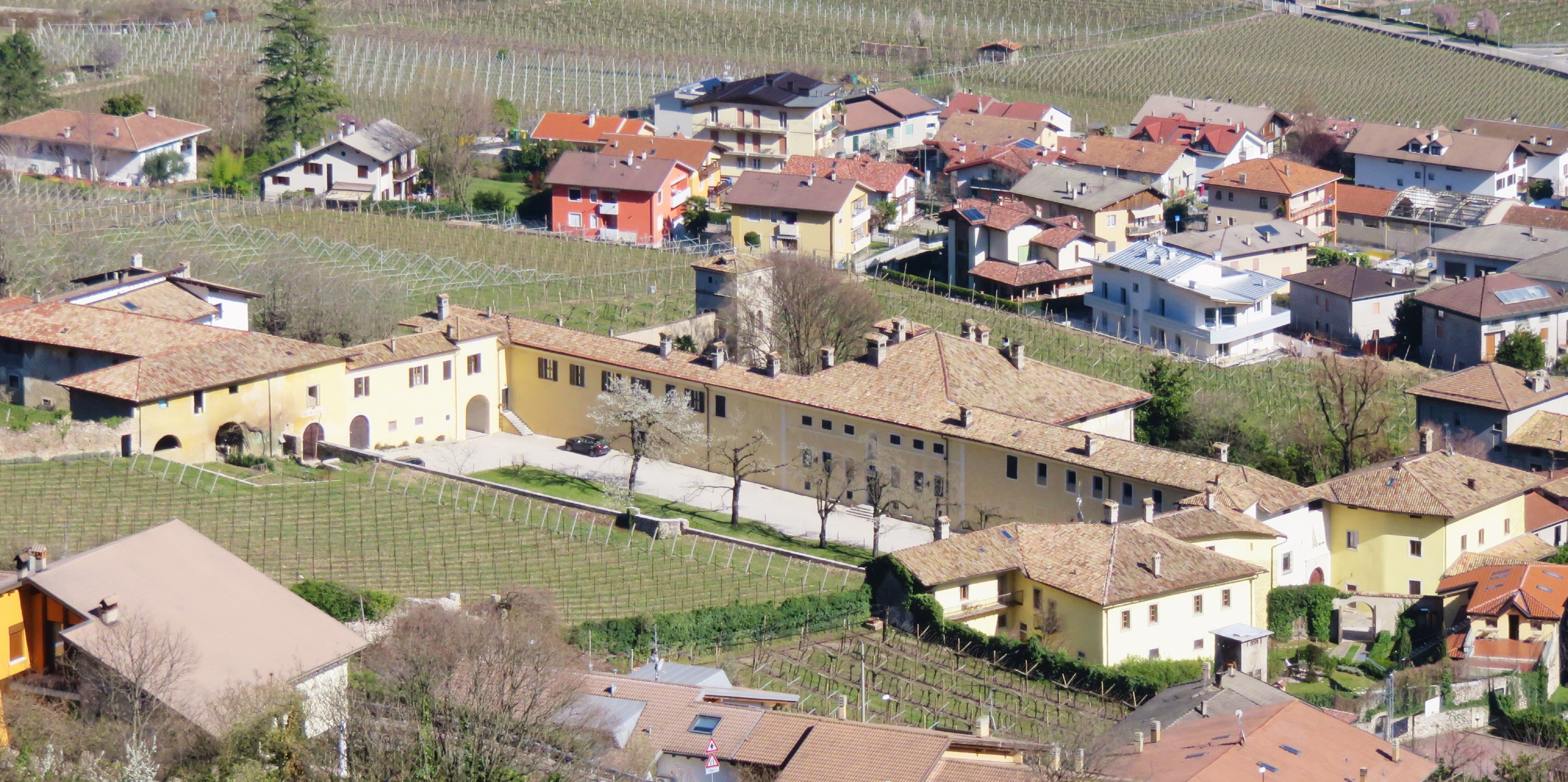 Vista dal castello. Palazzo dei conti Lodron, una delle famiglie più importanti della Vallagarina